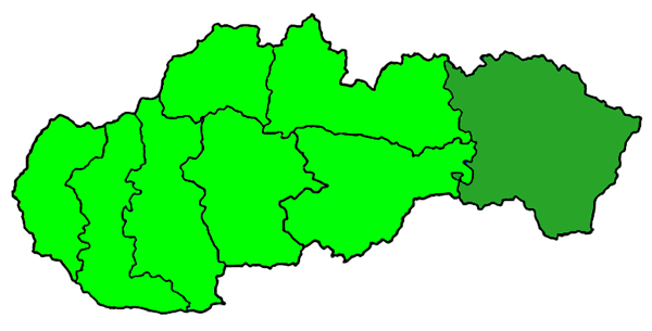 Mappa dell'arcidiocesi cattolica (roman catholic) di Kosice, in Slovacchia. Lavoro personale.